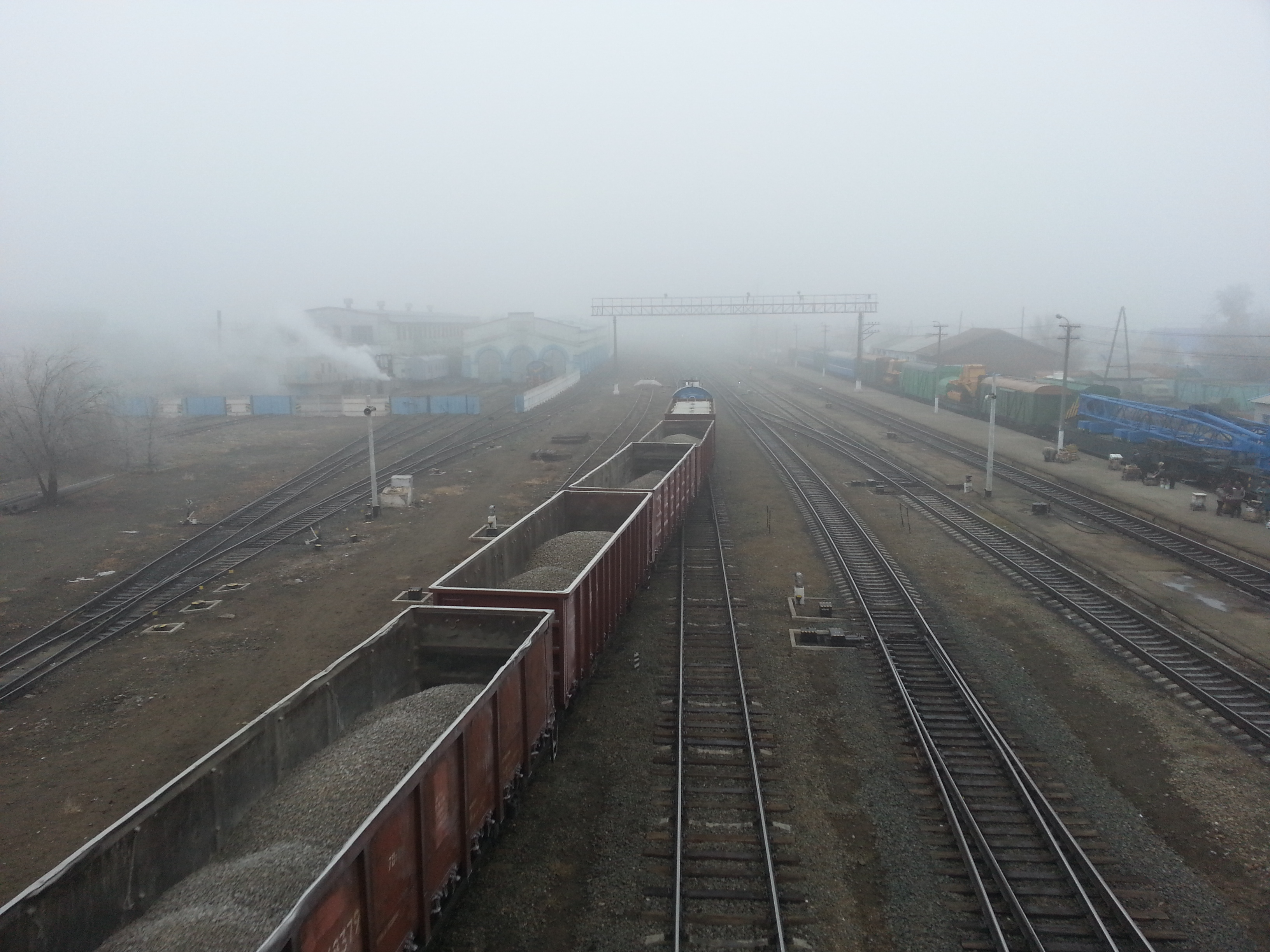 Депо (Шалкар, Казахстан)